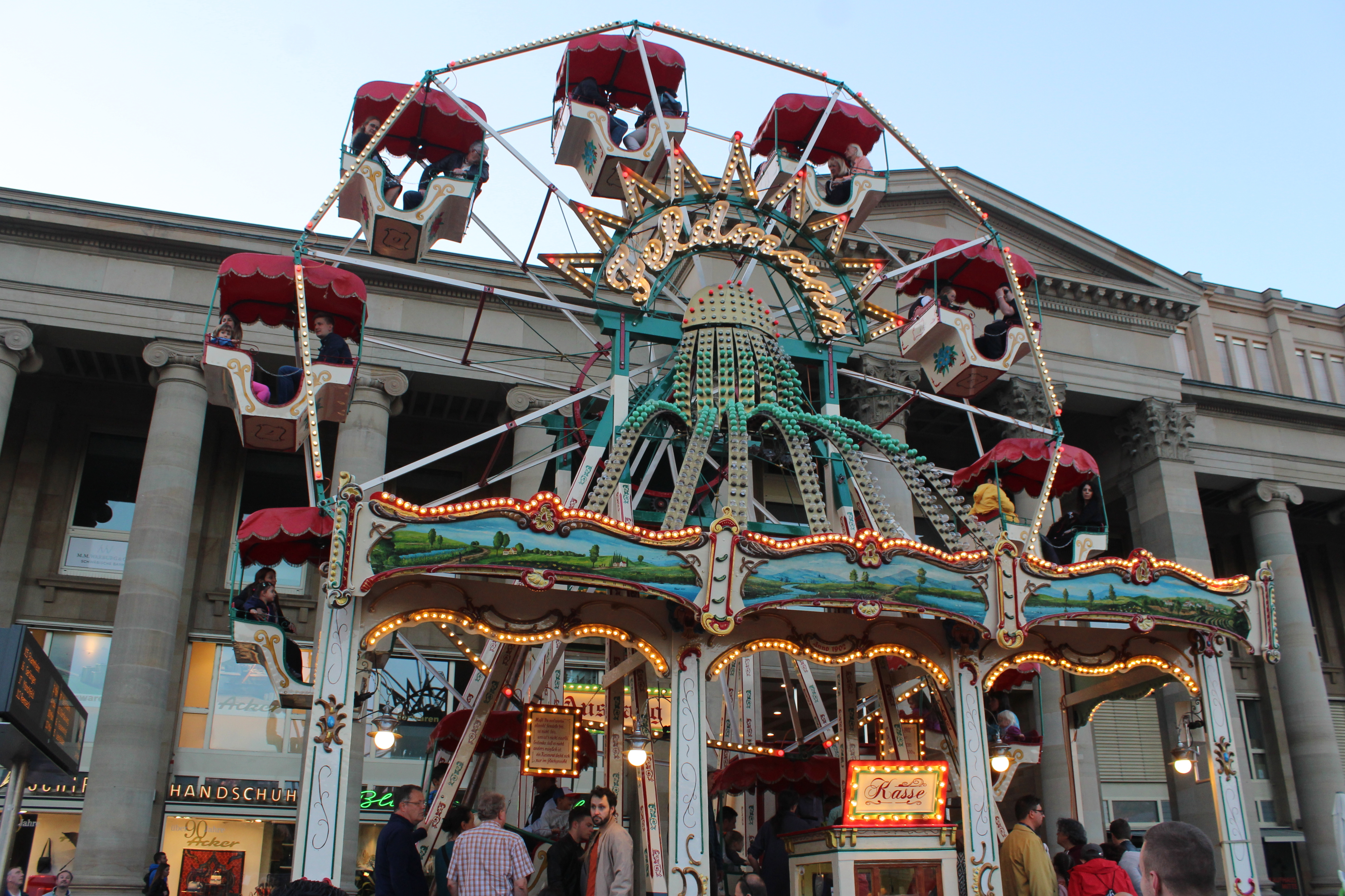 Riesenrad auf dem Historischen Stuttgarter Volksfest 2018